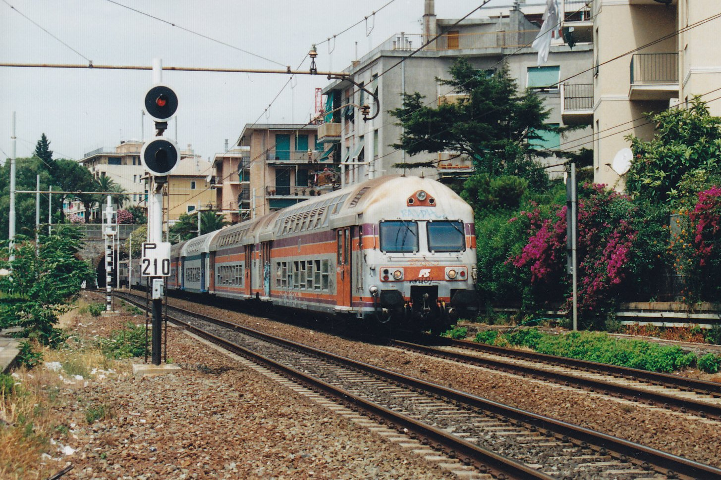 Treno a 2 Piani - Genova